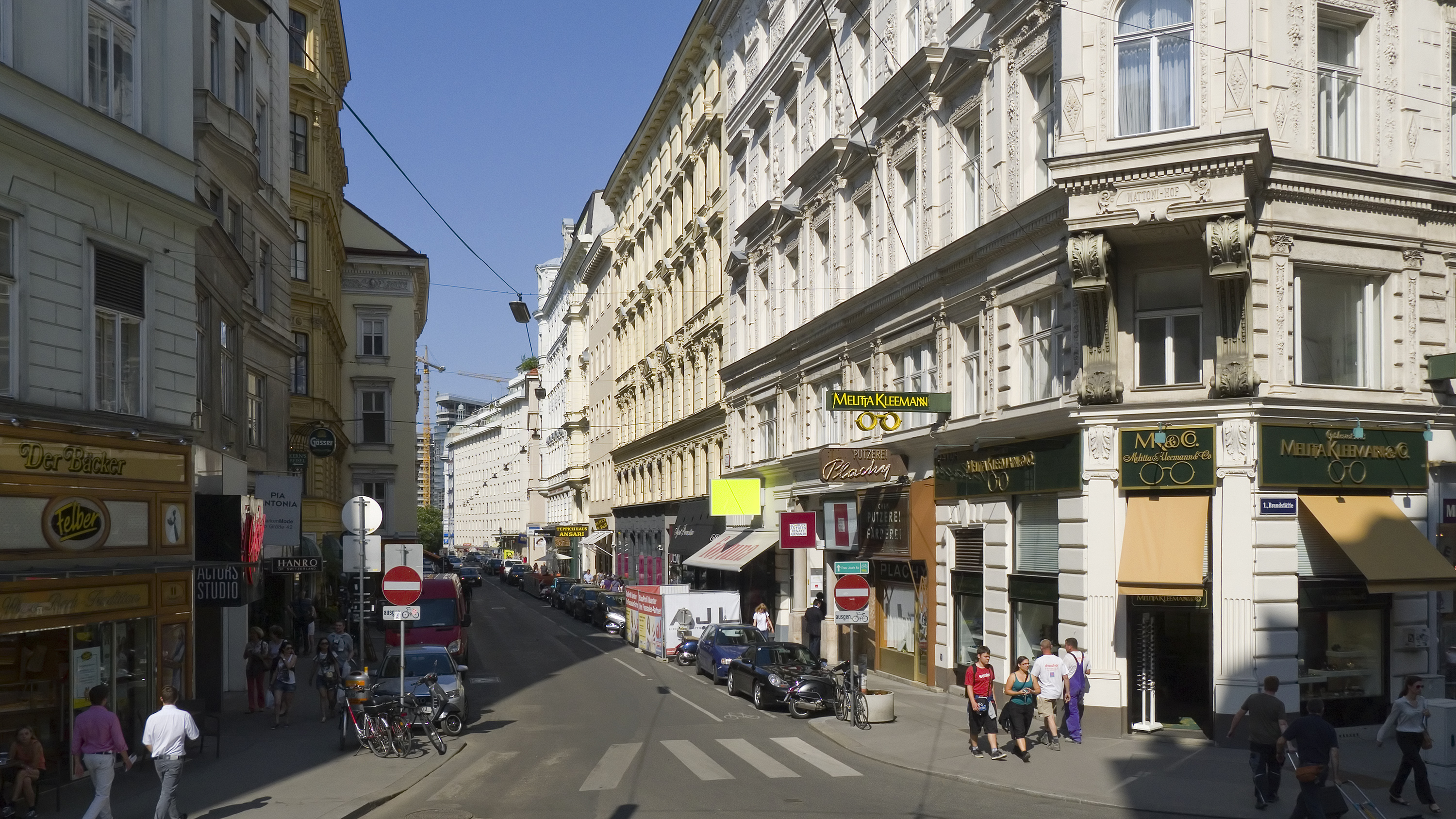 Tuchlauben in Wien 1 bei der Brandstätte Richtung Nordosten